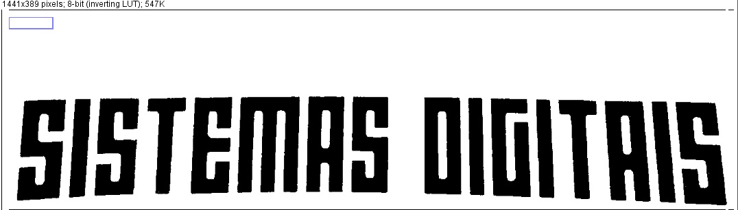 Imagem após passar pelo processo de segmentação.